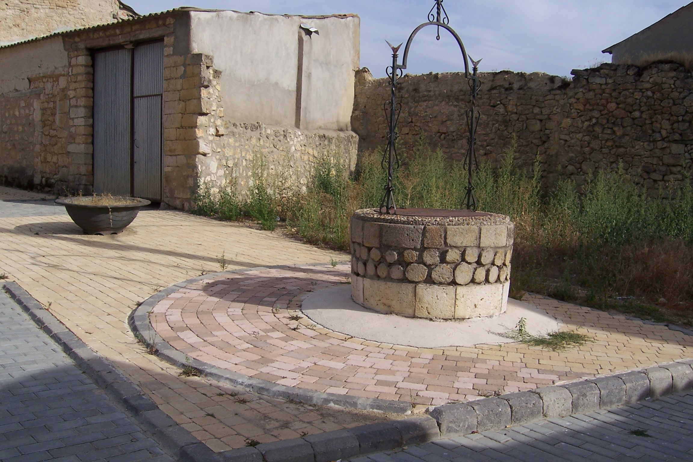 Villalba de los Alcores en la provincia de Valladolid, España. Arquitectura popular y pozo.